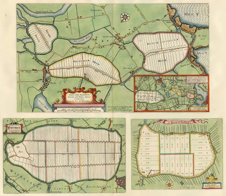 Kaarte vande Buyckslooter(Inzet: Kaarte van Waterland) - Caerte van de Purmer - Byllemer-meer